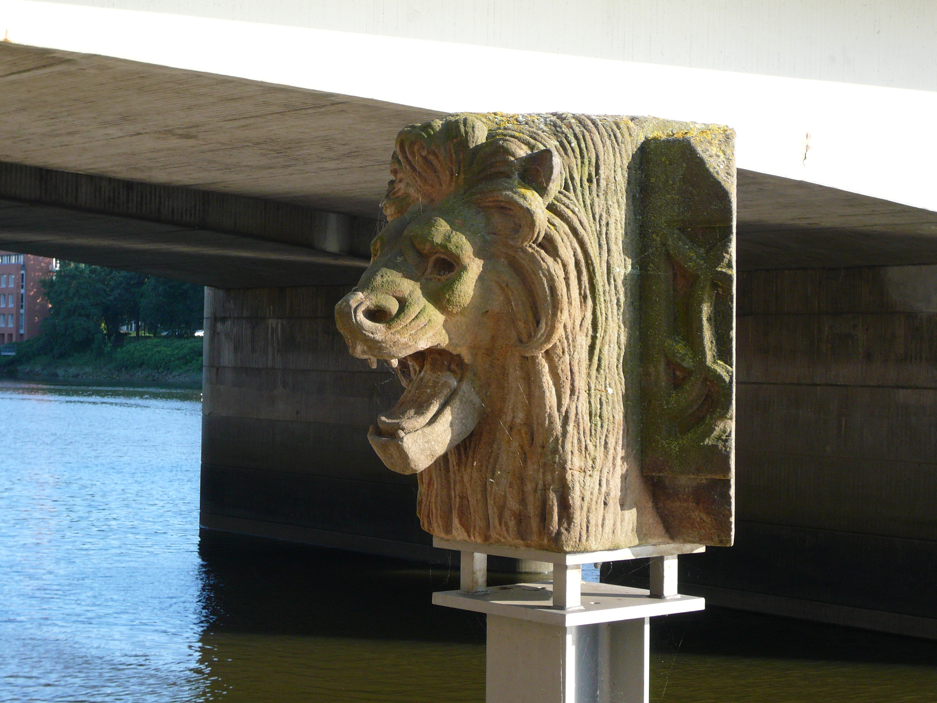 Der Löwenkopf unter der Bremer Wilhelm-Kaisen-Brücke